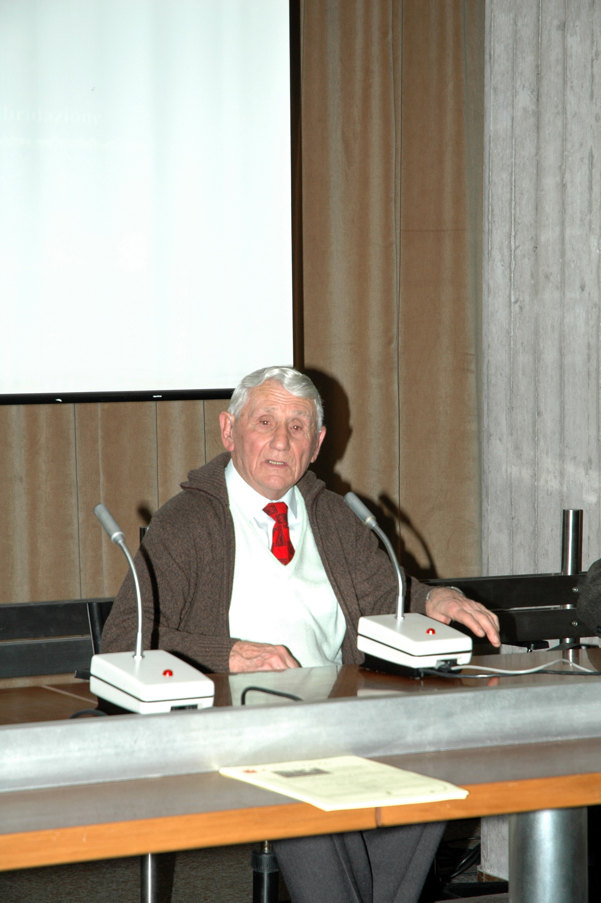 Giulio Pantoli durante una conferenza